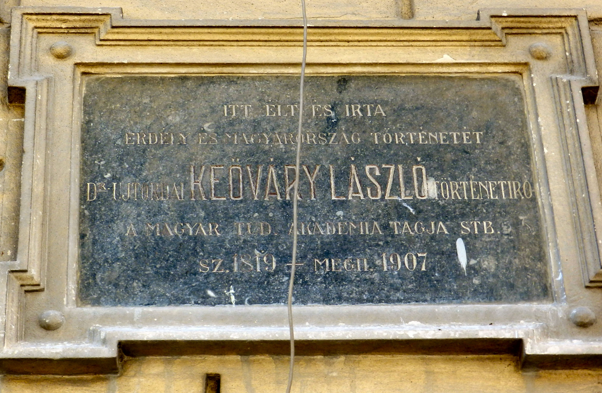 Kőváry László emléktábla Kolozsváron